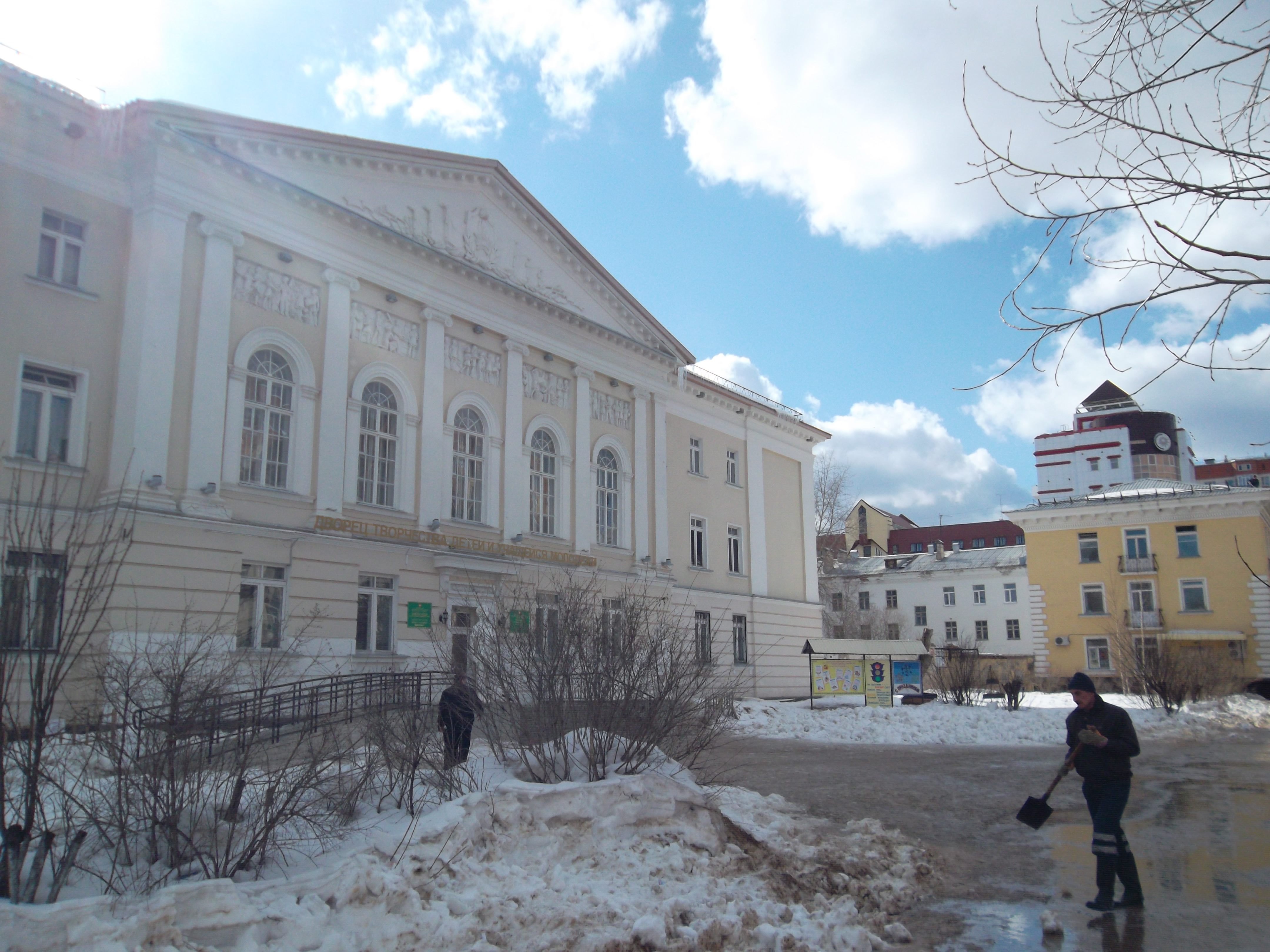 Дом творчества детей и учащейся молодёжи.